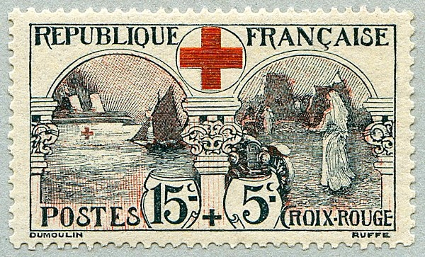 Timbre émis en 1918 (France) avec une surtaxe pour la Croix-Rouge française (premier timbre français pour la C.R.) : 15 cent. + 5 cent. Dessinateur Louis-Jules Dumoulin, graveur Léon Ruffe.